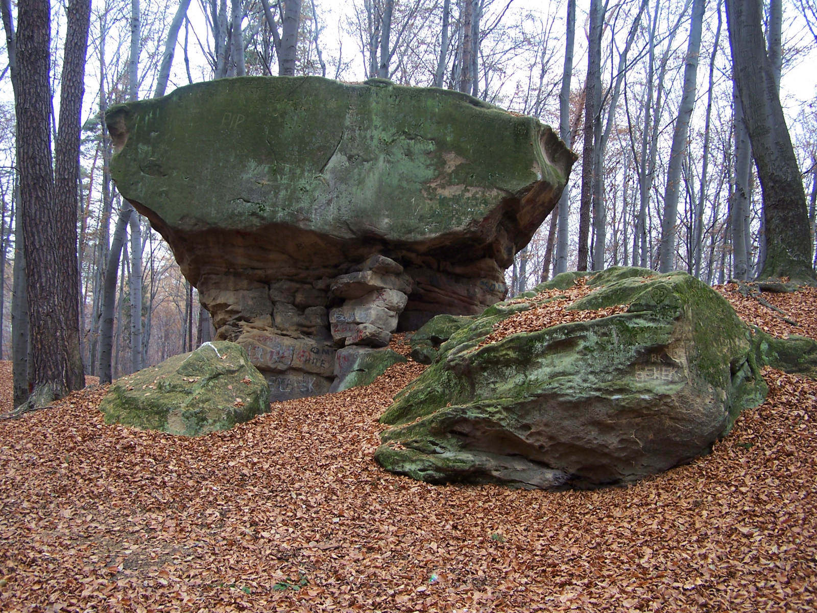 Reserve nature Kamień Grzyb (Pogórze Wiśnickie)